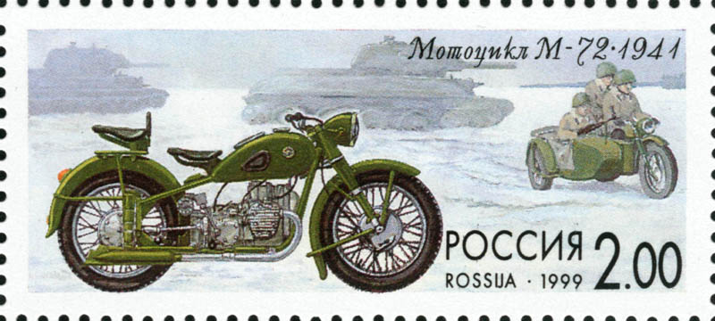 Марка, Россия, 2 рубля, 1999. Мотоцикл М-72